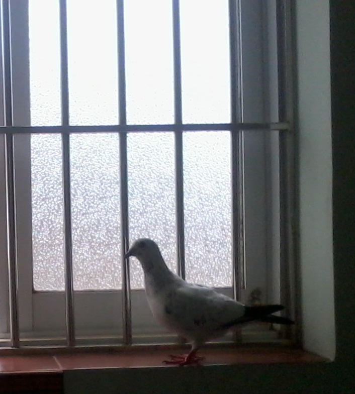 Hình tự chụp bằng máy ảnh một con bồ câu Việt Nam ở Bình Hưng Hòa A, Quận Bình Tân, TP.HCM